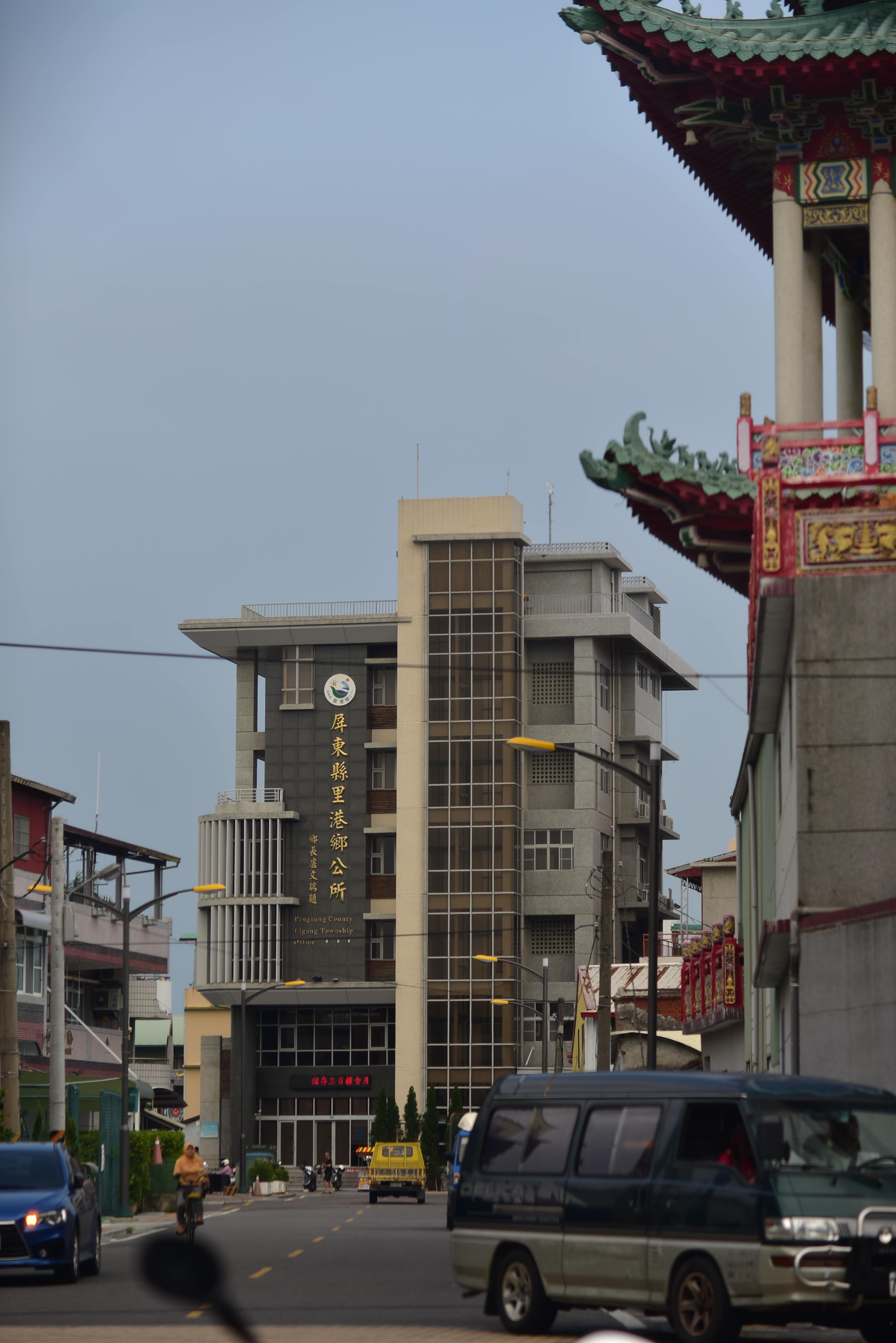 中文（台灣）: 屏東縣里港鄉公所2017